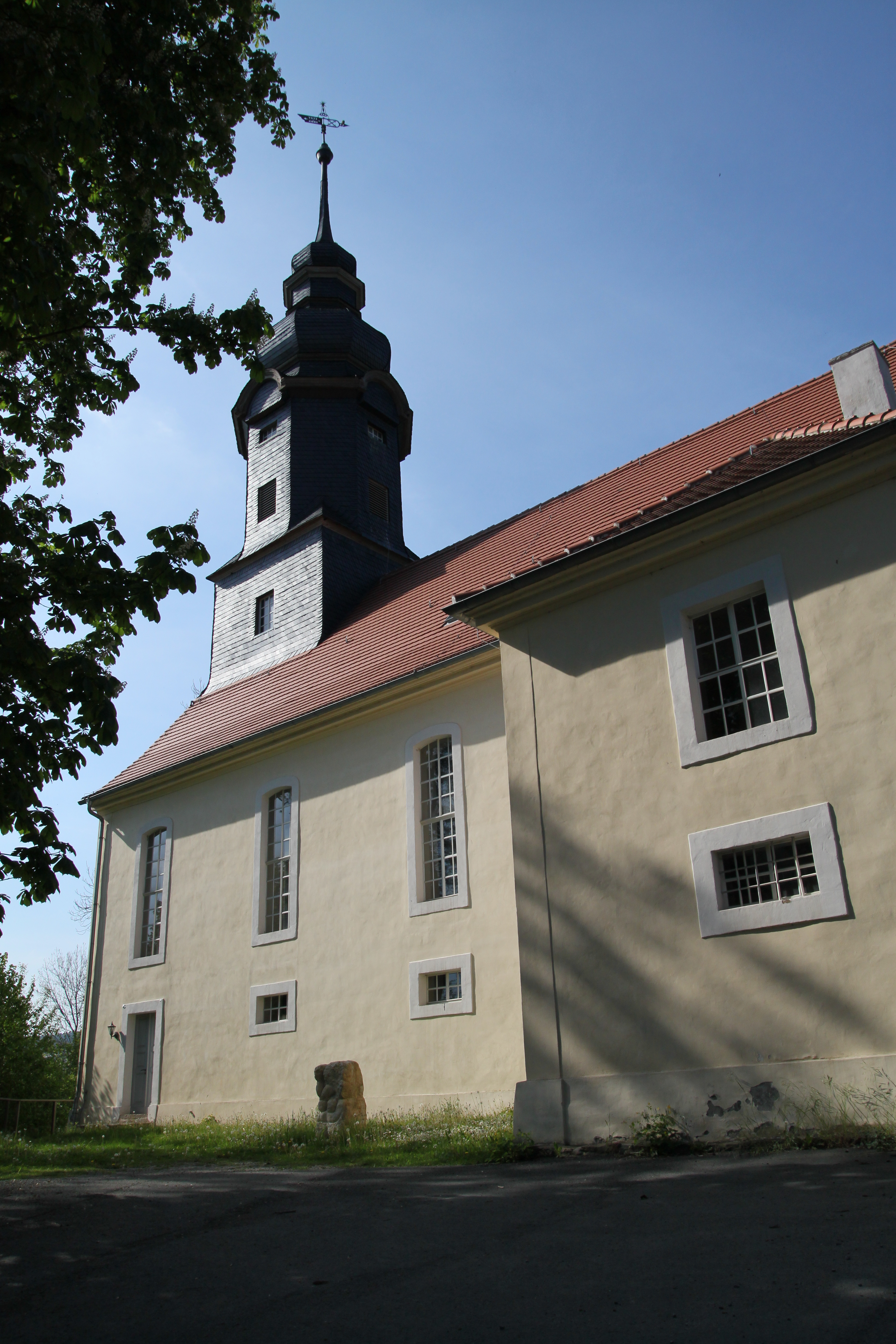 Dorfkirche Schlöben